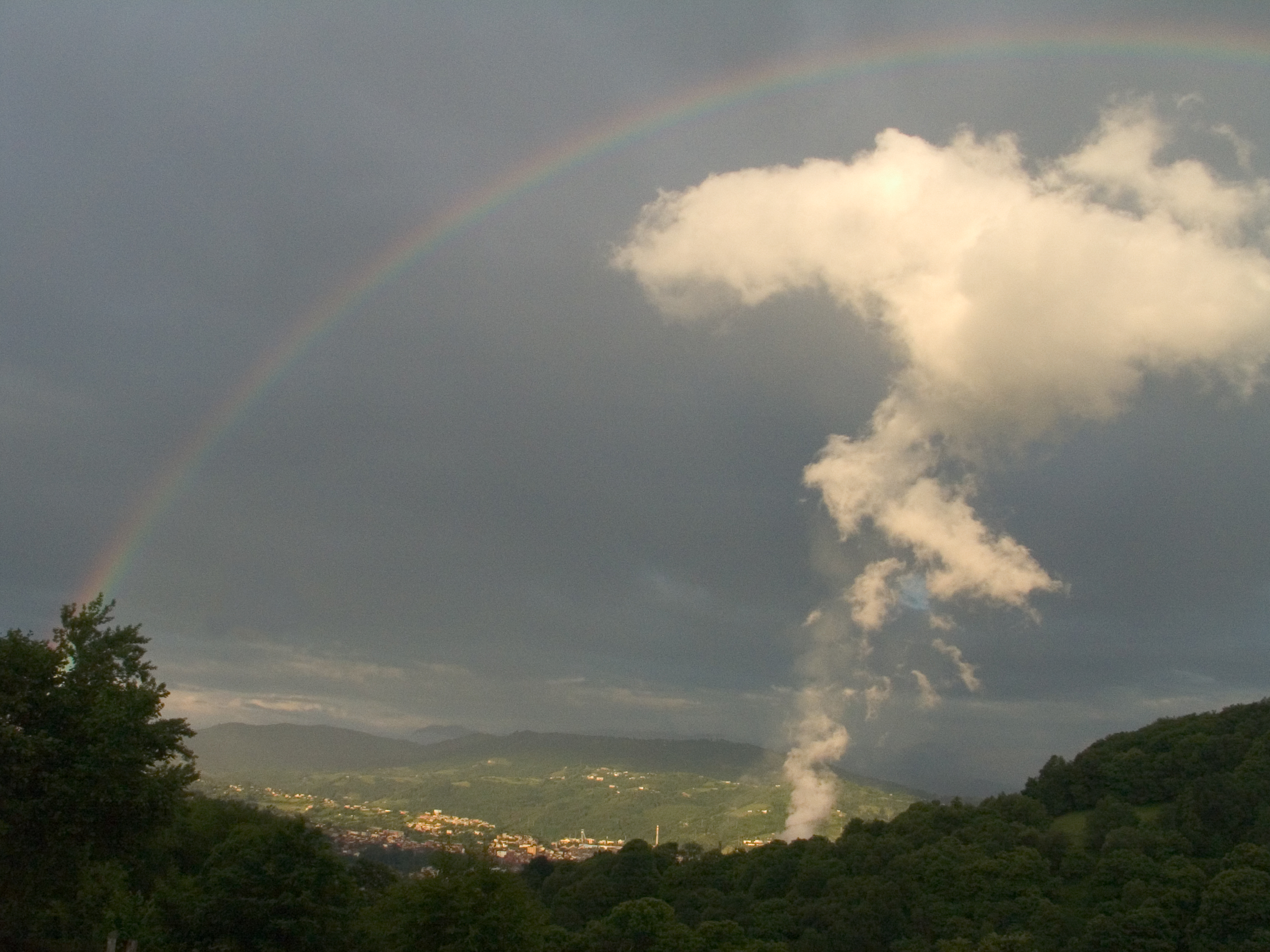 Arco Iris sobre la Felguera tomada desde Veneros